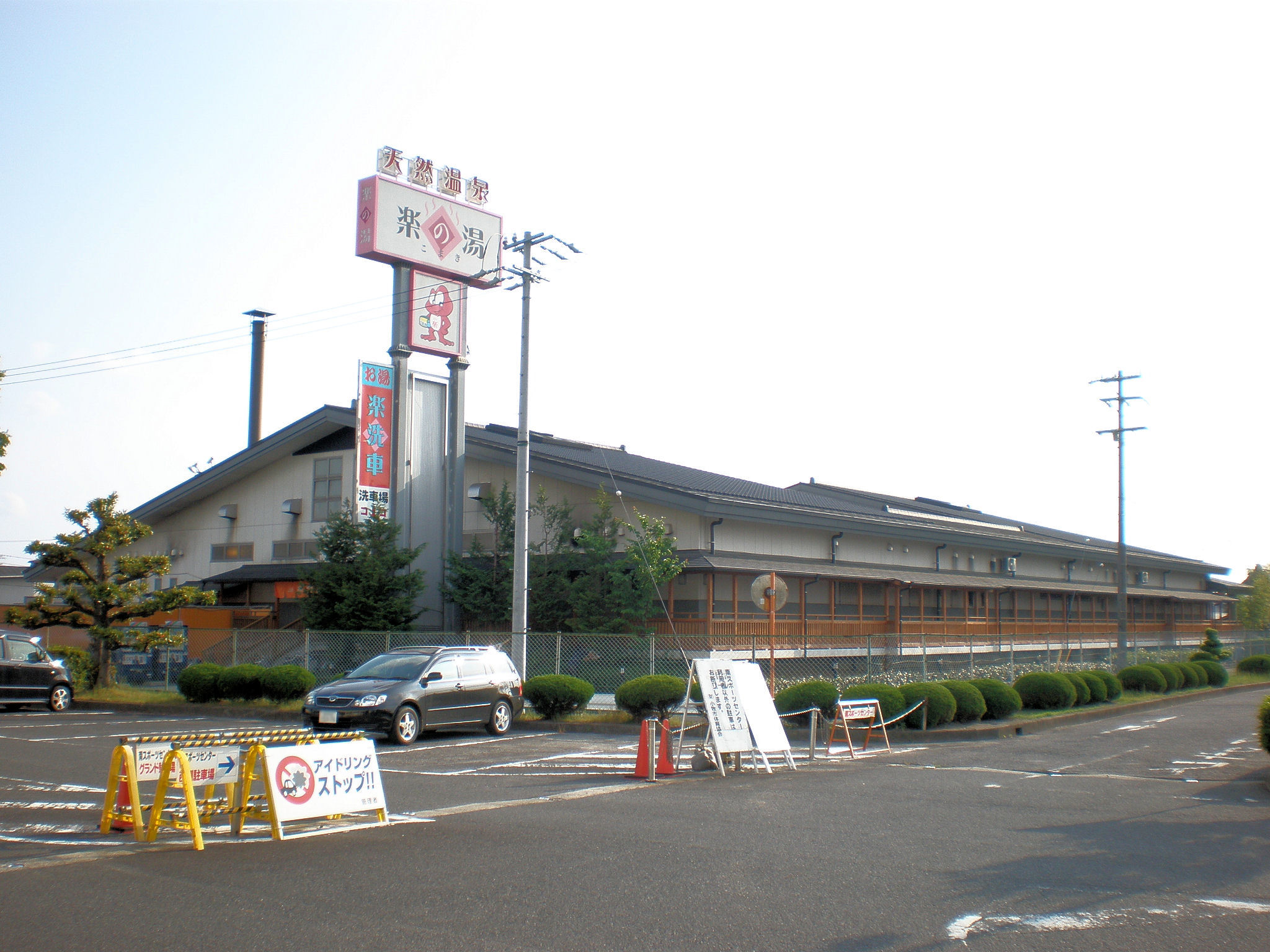 愛知県小牧市にあるこまき楽の湯